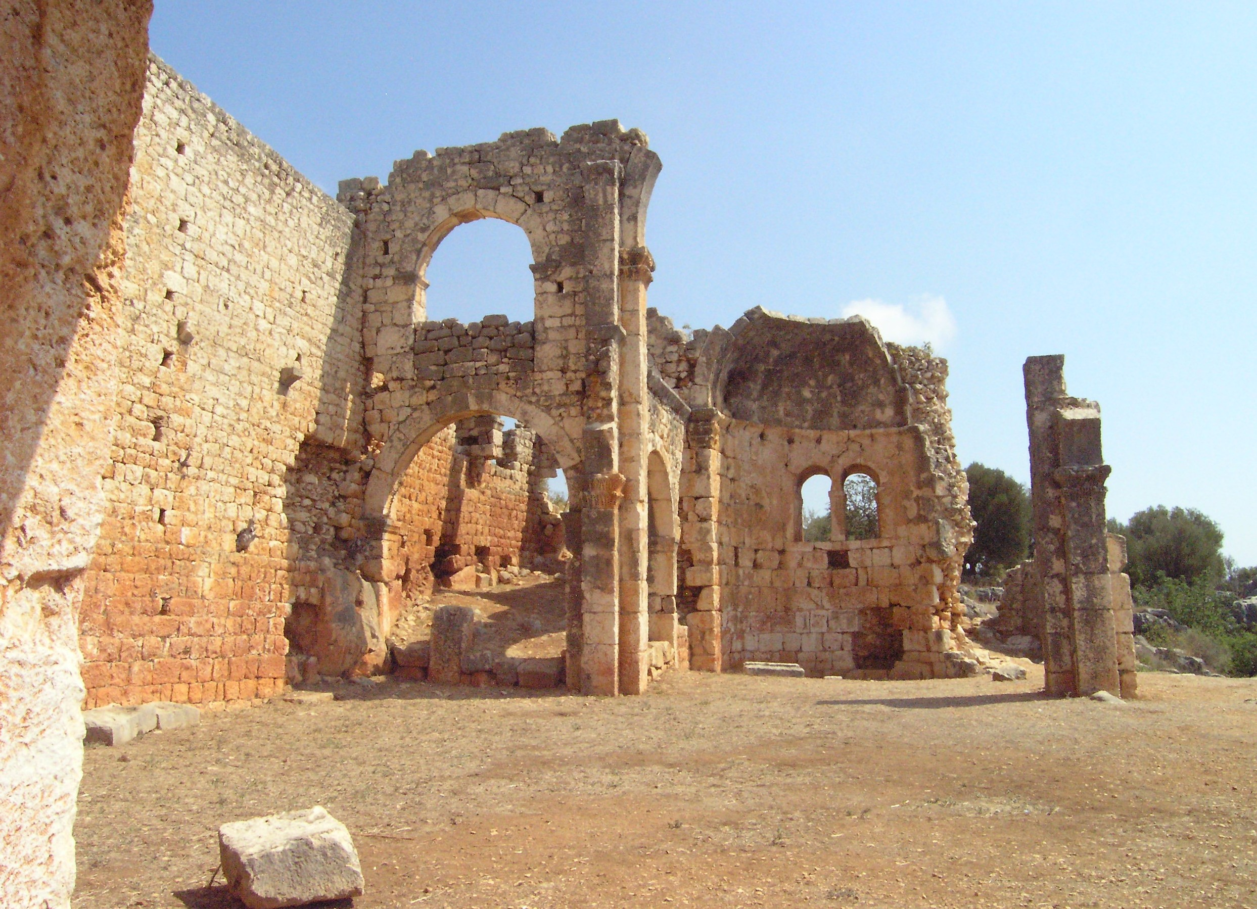 Kanytelleis (türkisch Kanlıdivane), Byzantinische Basilika 4 - Papylos-Kirche, Kirchenraum